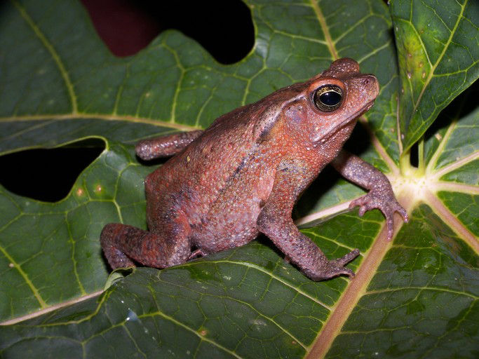 Bufo margaritifer